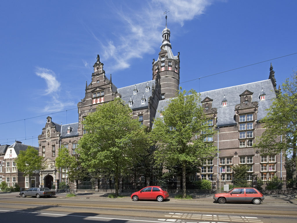 Gymnasium Haganum, een middelbare school in Den Haag